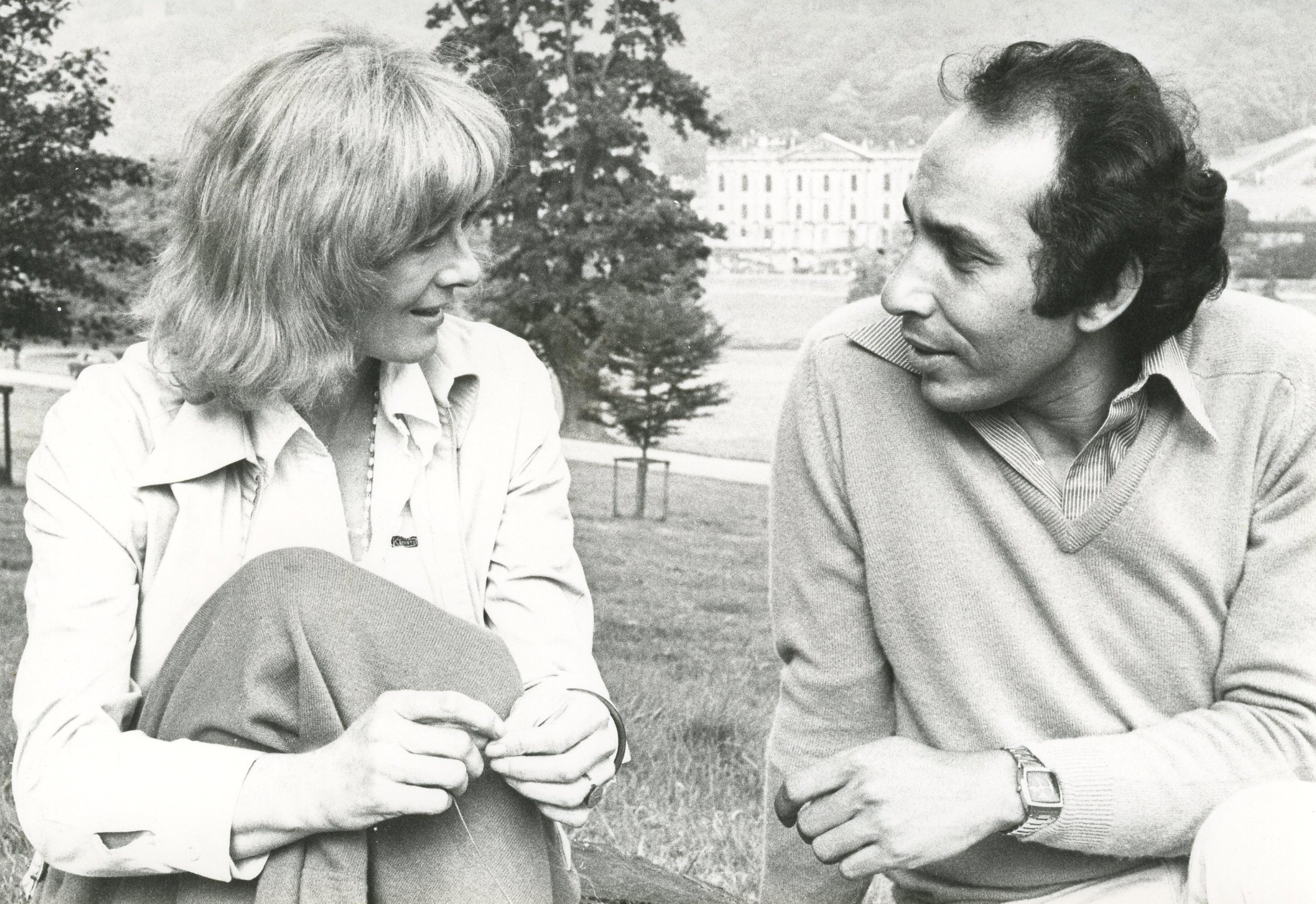 مع فانيسا ردجريف بالقرب من بارويتش في شمال إنجلترا أثناء تصوير فيلم فانيسا تتحدث إلى فاروق عبد العزيز في أغسطس 1978